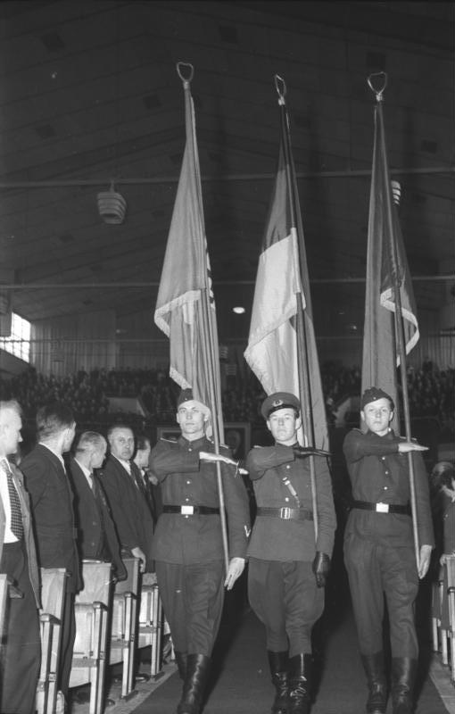 IV. Parteitag der Sozialistischen Einheitspartei Deutschlands, Berlin, Werner-Seelenbinder-Halle. Am 6.4.1954 begrüßte eine Delegation der Volkspolizei die Delegierten des Parteitages. UBz: Einmarch der Fahnengruppe der Kasernierten Volkspolizei.